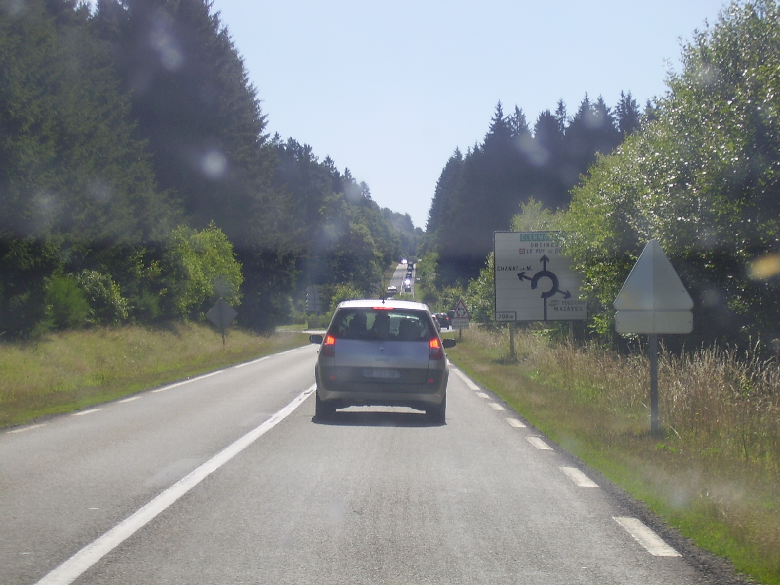 Carrefour giratoire entre la RD 941 et la RD 559, à Saint-Ours, Puy-de-Dôme, Auvergne, France. Au loin, la RD 941 continue vers Orcines et Clermont-Ferrand. La RD 559, en direction de Mazaye, dessert le parc Vulcania.